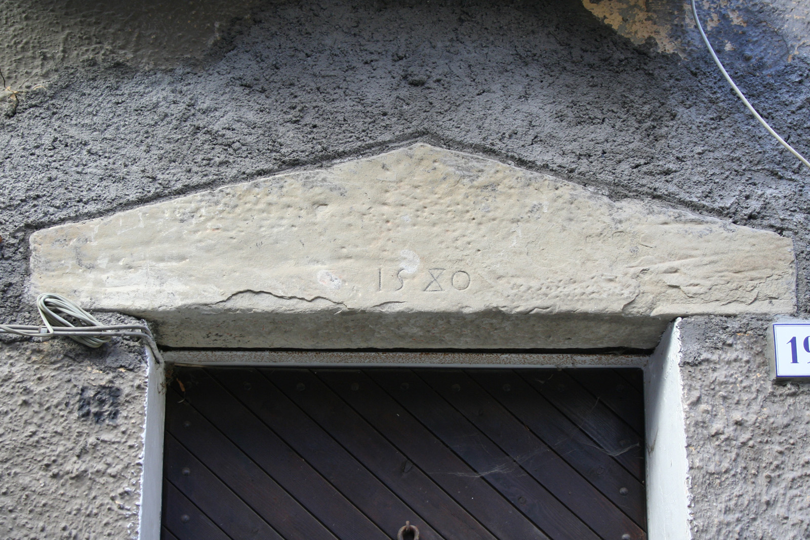 Pietracamela in provincia di Teramo, portale in pietra all'interno del paese.